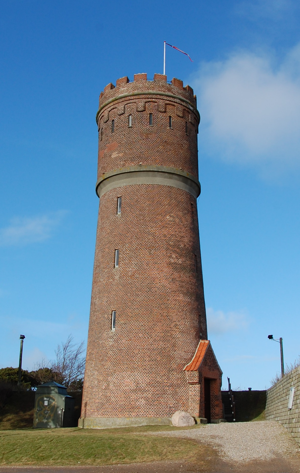 Wasserturm Nyköping